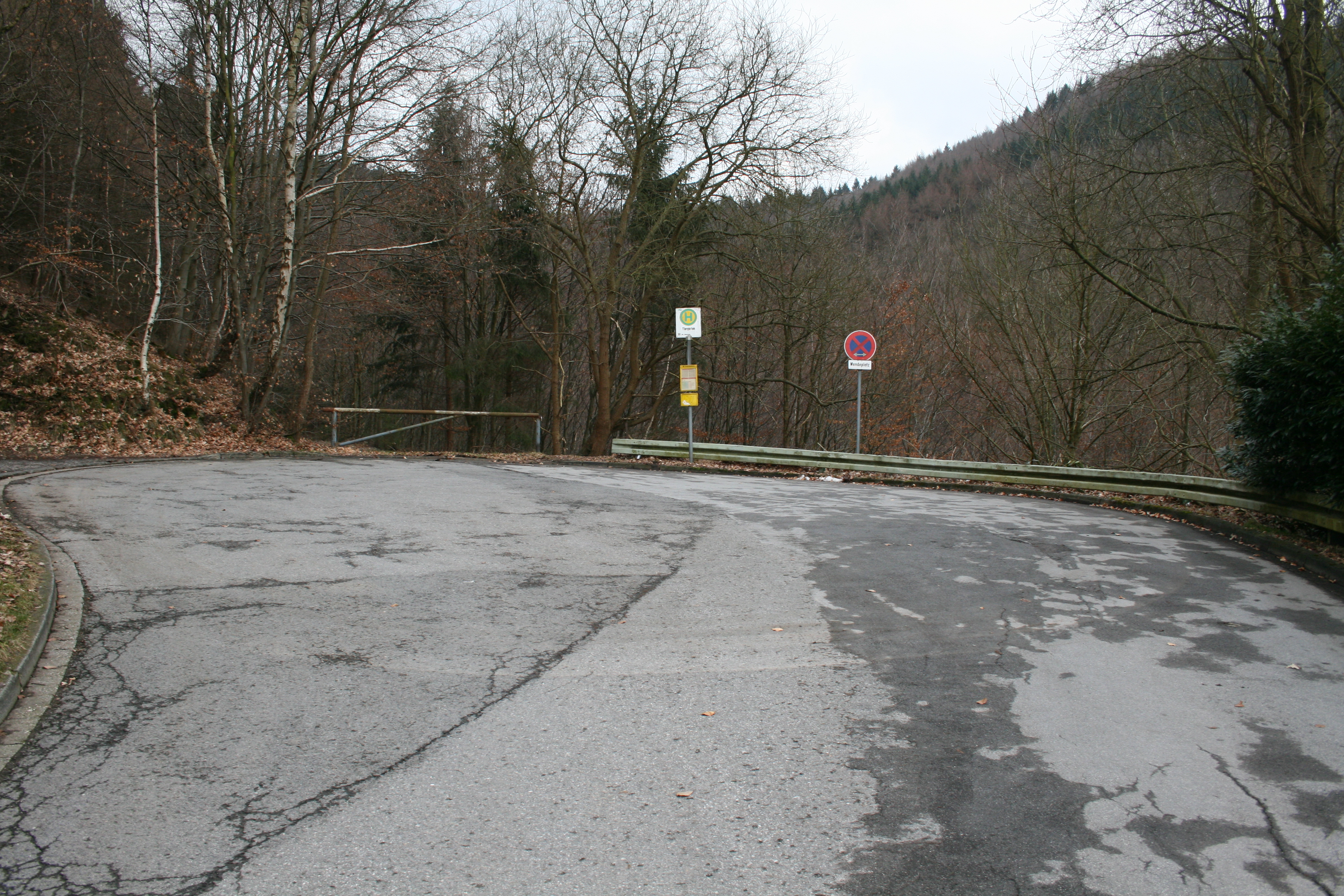 Bilde av siste stopp på bussrutene 30 og 31 i Tiergarten, Altena.